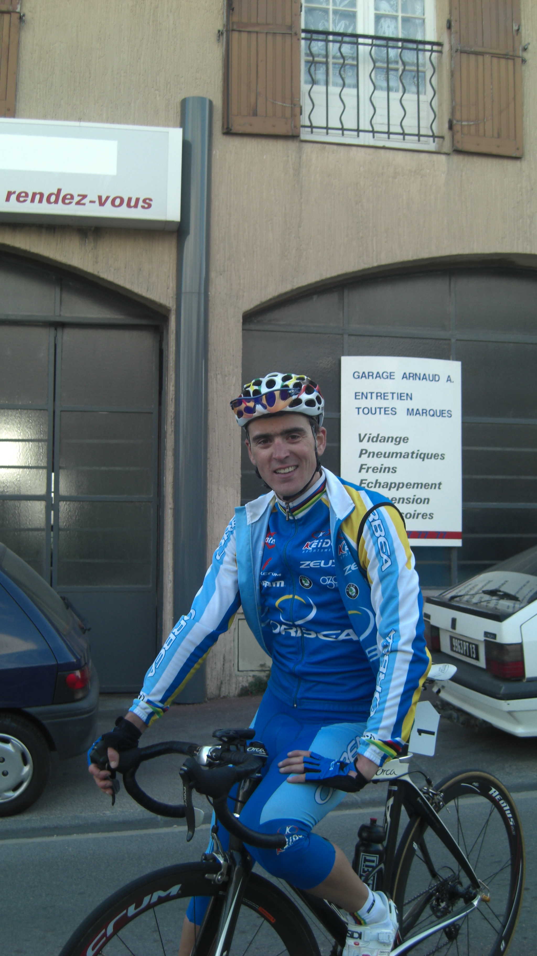 Le double champion olympique de Vtt-Cross, à l'arrivée d'une course routière d'entrainement (le grand prix Masse), à Château-Gombert (Marseille), le 24/02/2008